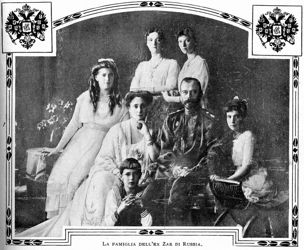 L'ex-zar Nicola II di Russia e la sua famiglia. Accanto allo zar la moglie Alessandra d'Assia. In primo piano l'unico figlio maschio Alessio. Attorno le figlie da sinistra a destra: Maria, Tatiana, Olga ed Anastasia. (1917). Descrizione originaria: La famiglia dell'ex Zar di Russia